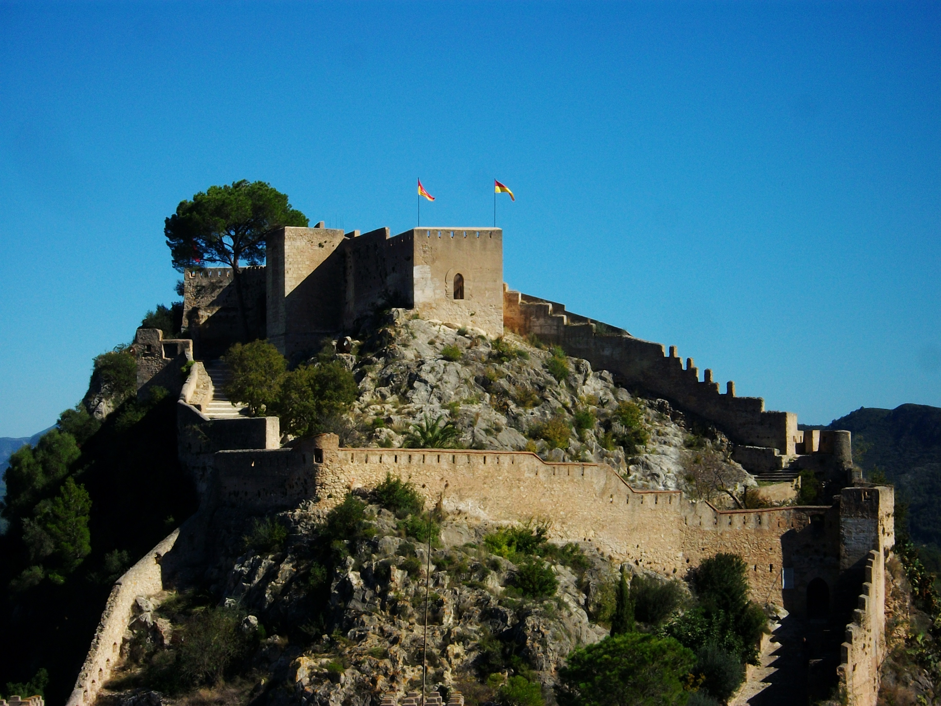 Castell Menor, Xàtiva.